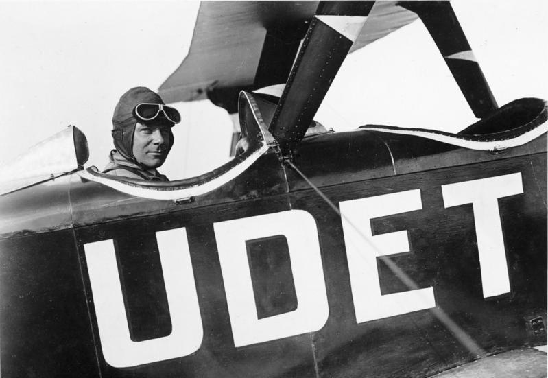 Der bekannte deutsche Kunstflieger Udet hat sich für die Rettung der verschollenen Italia-Mannschaft bereitgestellt und ist nach Spitzbergen unterwegs! Der Kunstlieger Udet in seinem Flamingo-Doppeldecker, mit welchem er die Italia-Mannschaft retten will.